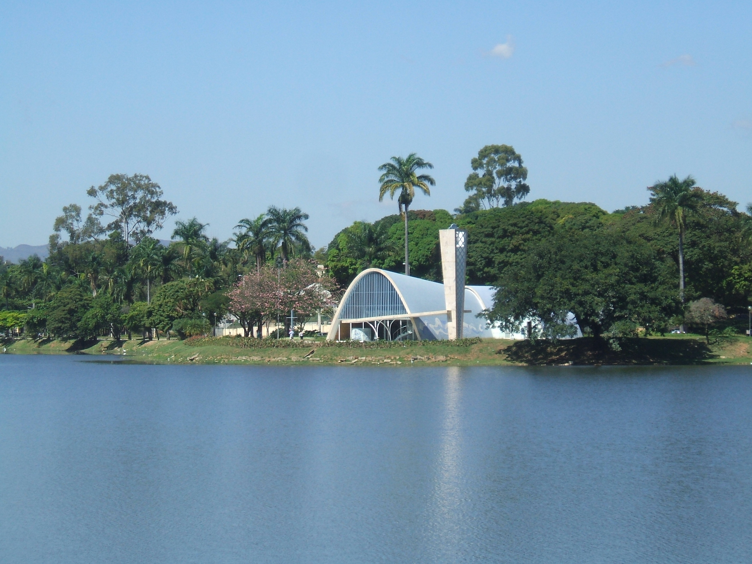 Visão Parcial da Lagoa da Pampulha, Minas Gerais